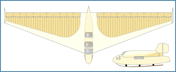 Lippisch Delta1